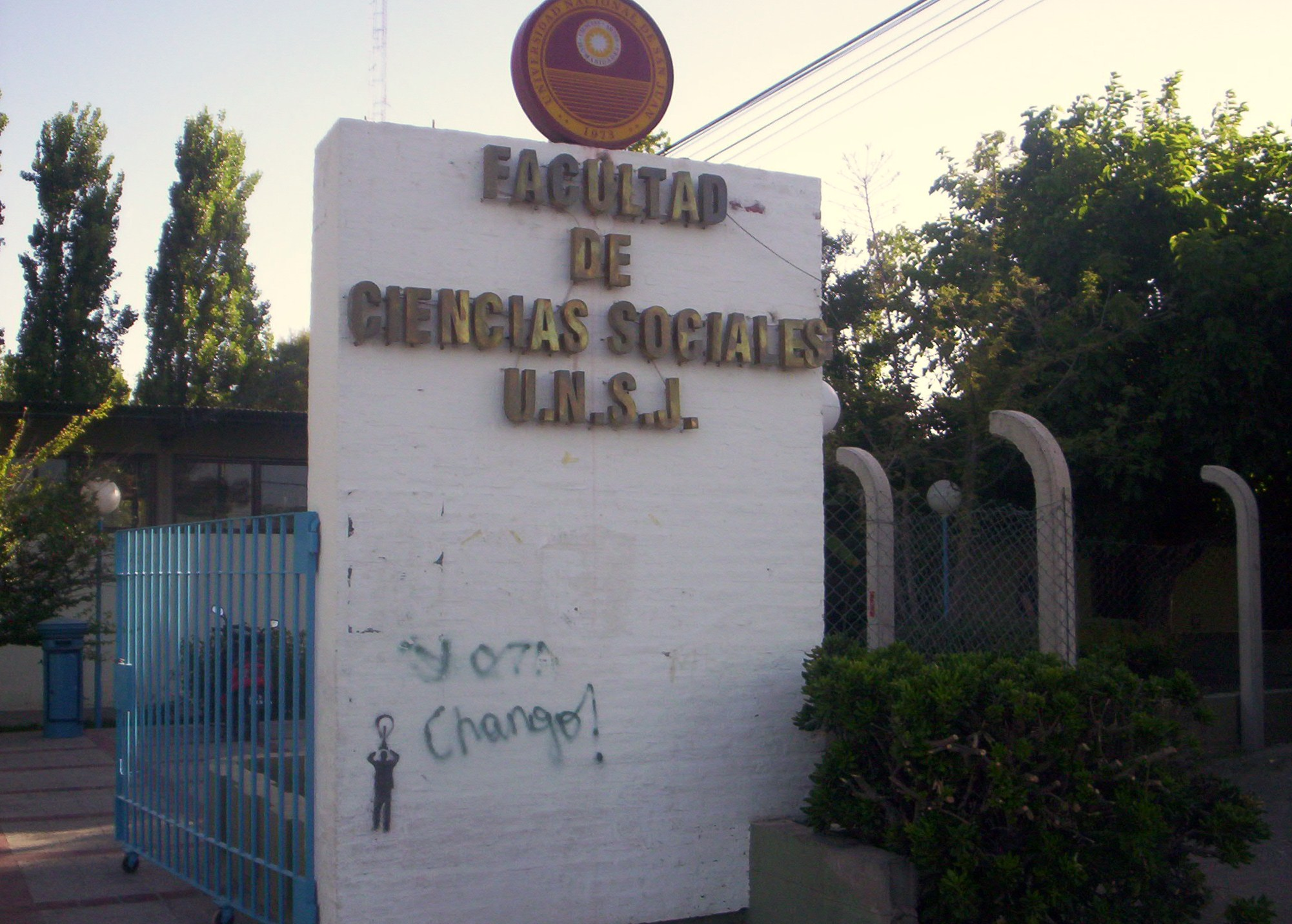 cartel de bienvenida de la facultad